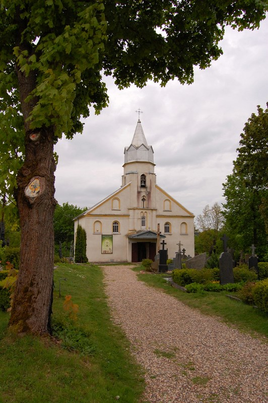 Lapių miestelio bažnyčia